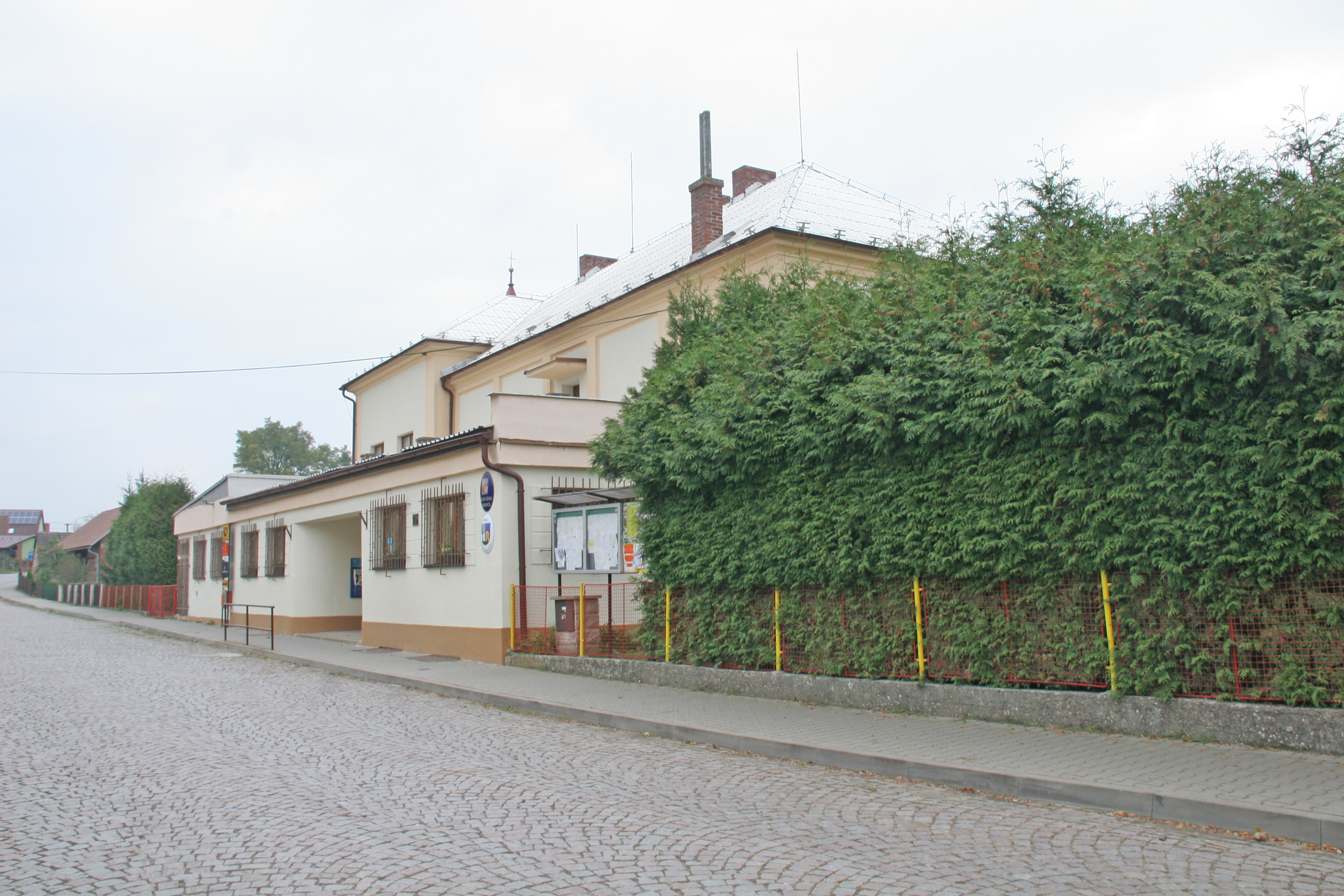 Jeníkovice 25 - obecní úřad